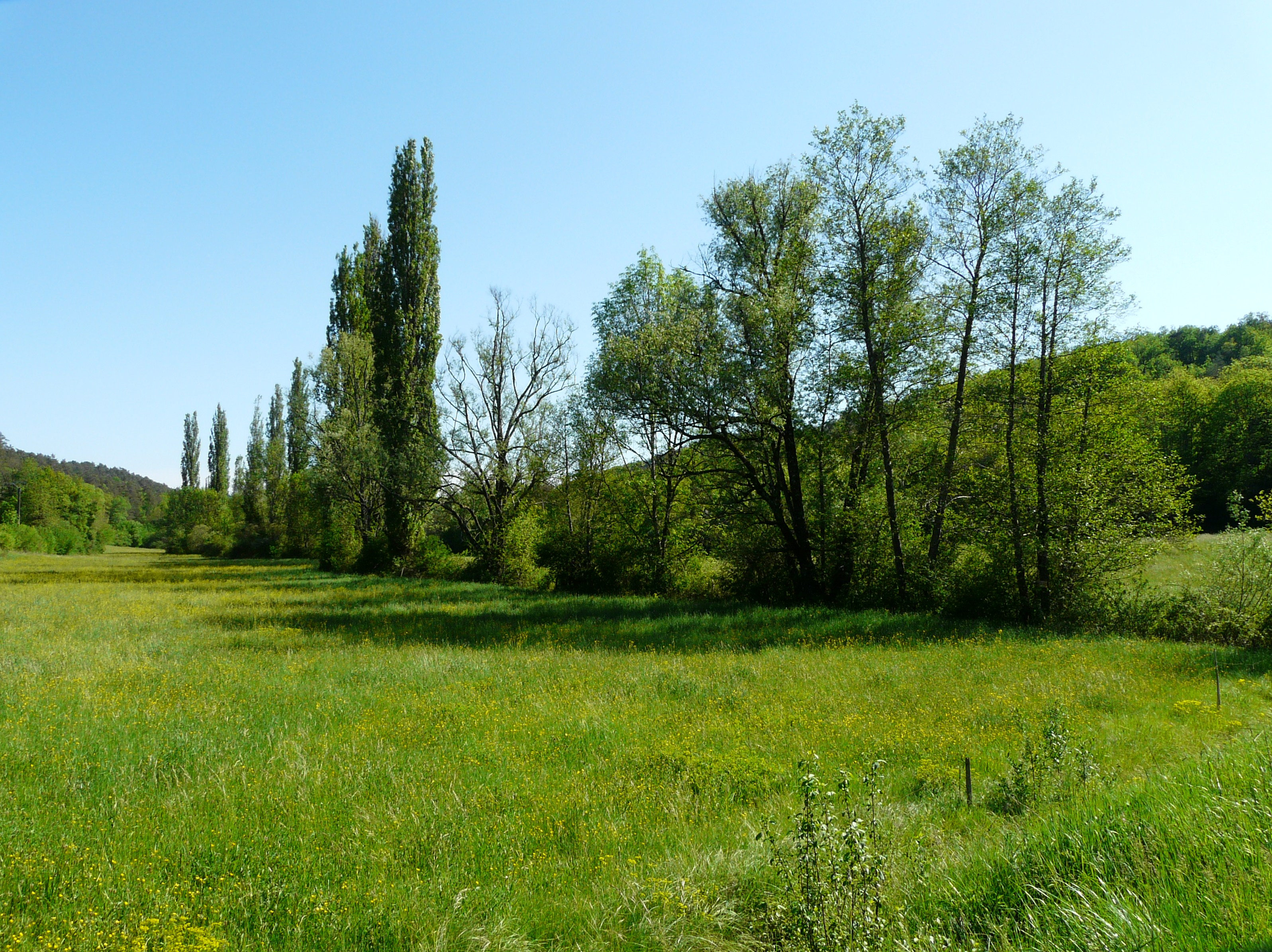 La vallée du Thonac au niveau du pont de Fanlac, Fanlac, Dordogne, France.